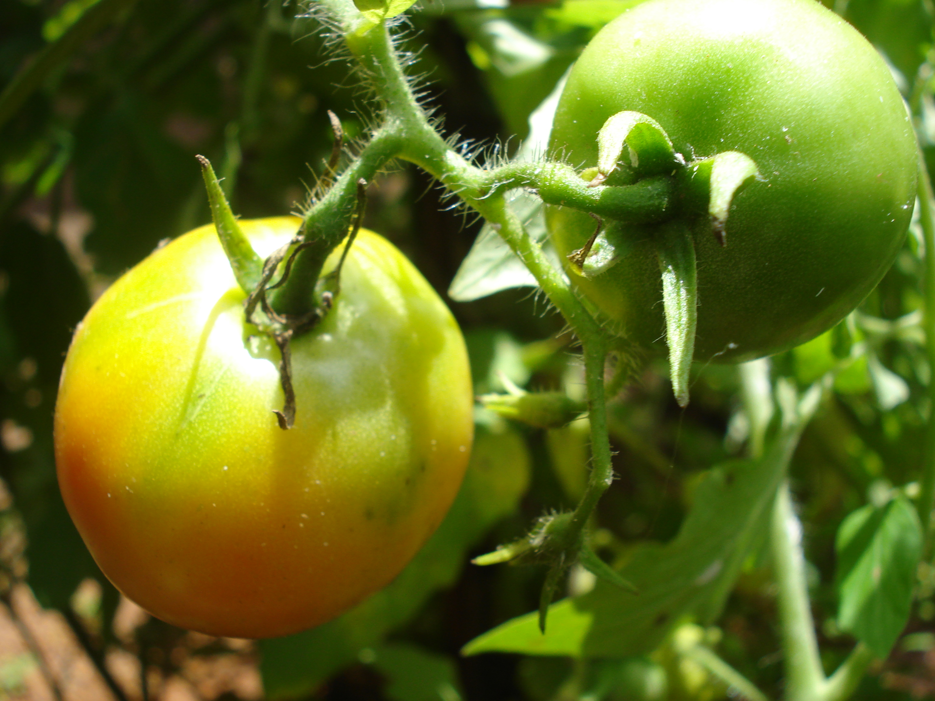 Tomato belongs to solanaceae family.It has woody stem that vines over other plants.